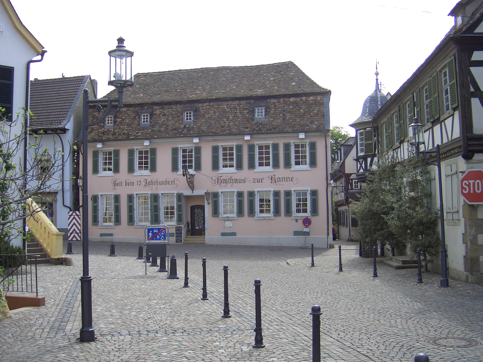 Gasthaus zur Kanne, Deidesheim